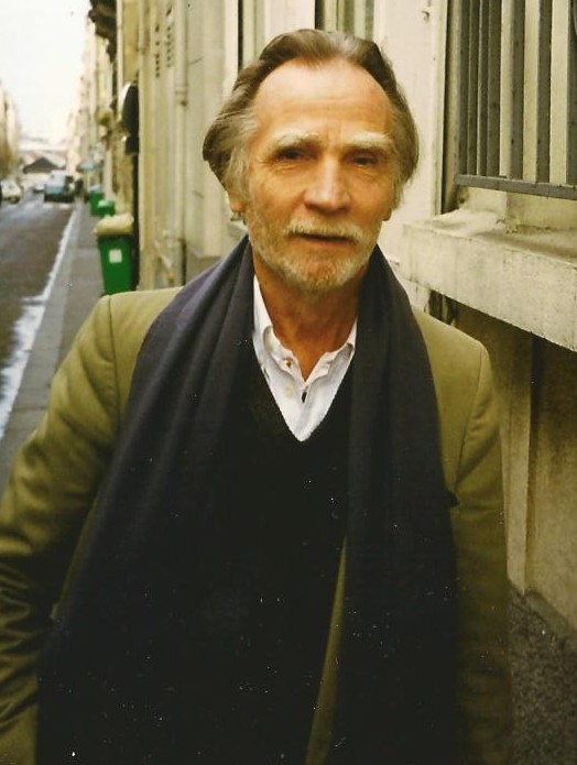 Willy Holt, décorateur de cinéma français.